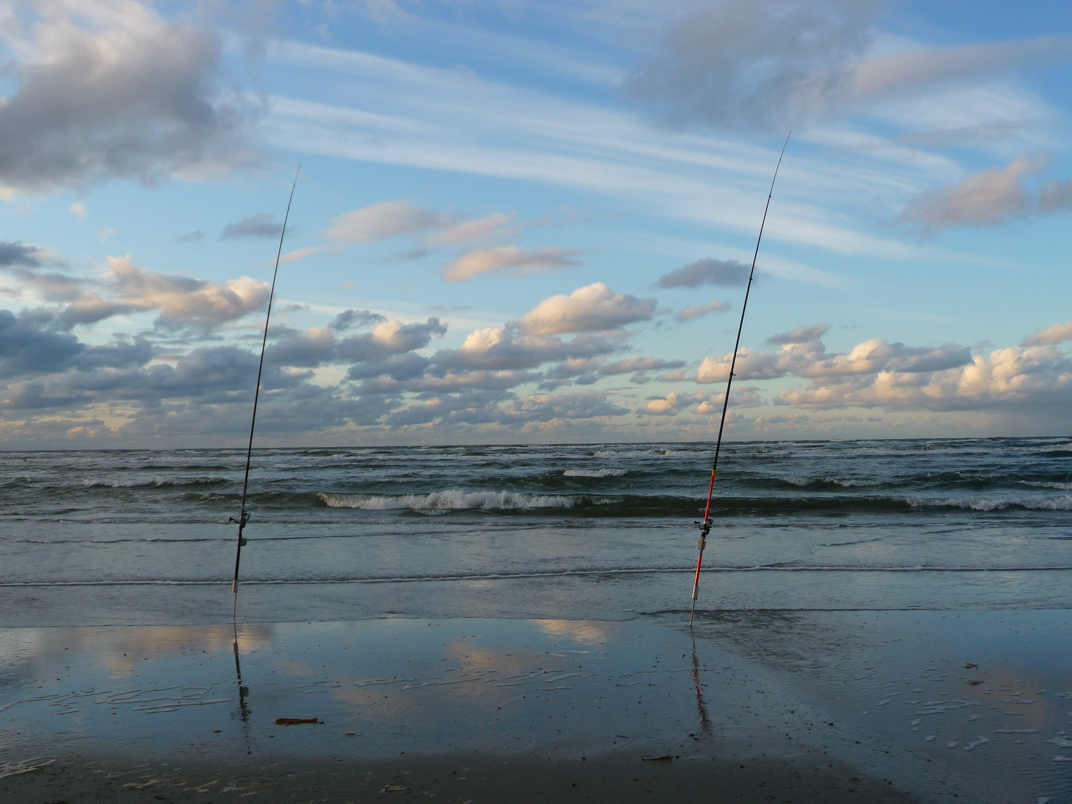 Zwei Angelruten bei auflaufendem Wasser im niedersächsischen Wattenmeer vor der ostfriesischen Nordseeinsel Juist (Niedersachsen, Deutschland); Fang: u. a. Wolfsbarsch